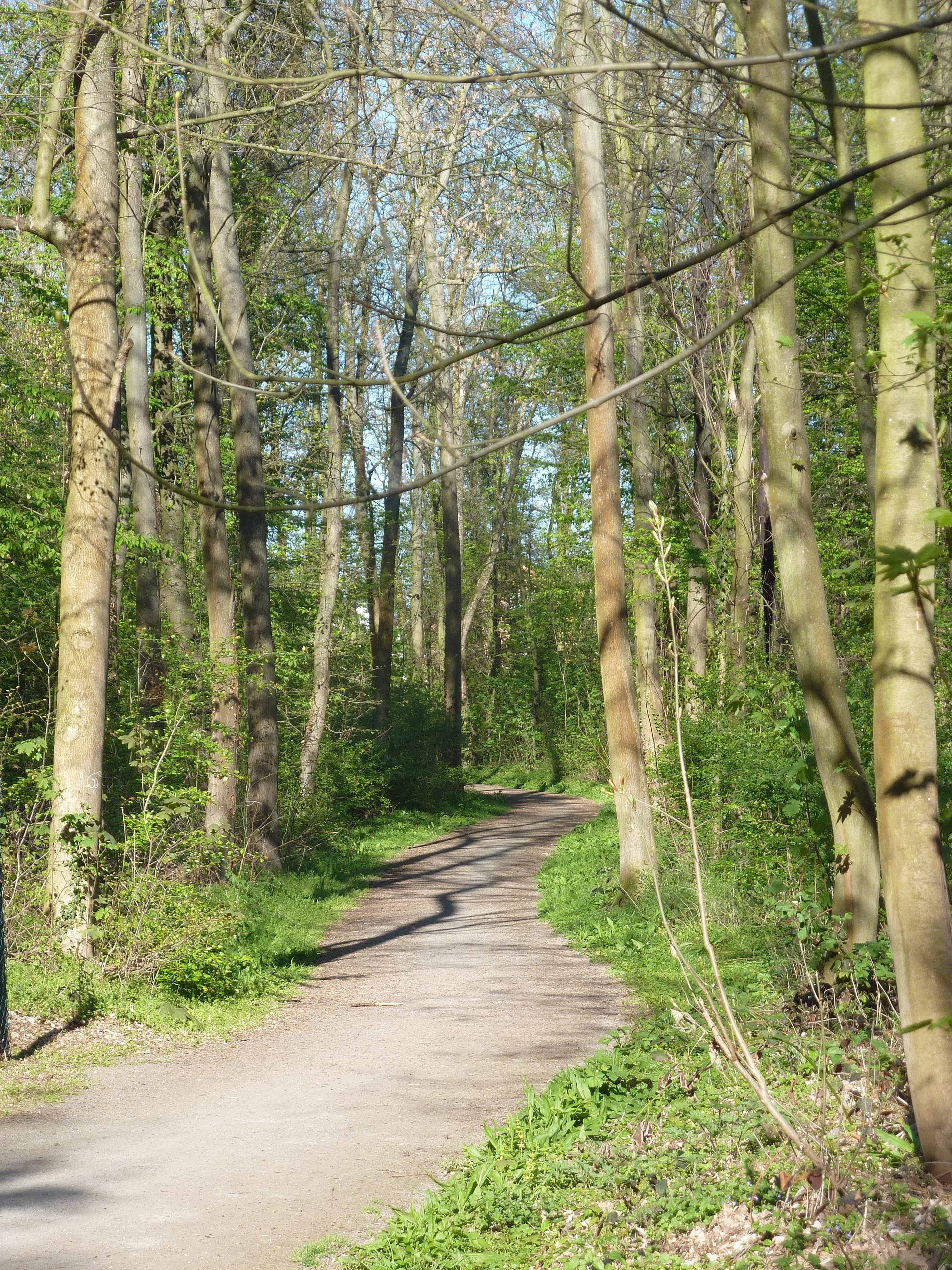 Eisenbahnstrecken in Frankfurt am Main: Die Kaiserkurve war ein 1905 eröffneter Abschnitt der Bäderbahn Bad Nauheim–Wiesbaden, nach ihrem Befürworter Kaiser Wilhelm II. im Volksmund auch „Kaiserbahn“ genannt. Dieser Teil einer Verbindungsbahn verband den Bahnhof Frankfurt-Rödelheim mit der Taunus-Eisenbahn in Richtung Wiesbaden. Die Kaiserkurve führte durch den Niedwald, Waldstück bei Frankfurt-Nied. Sie wurde Anfang der 1960er-Jahre stillgelegt, und ein Teil der Trasse wurde mit einer Wohnsiedlung überbaut. Auf dem übrigen Geländeteil wurde entlang des abgetragenen Bahndamms der bis in die Gegenwart bestehende Kaiserbahnweg durch den Niedwald angelegt. Im Bild ein Abschnitt des Waldwegs, Blick nach Nordosten